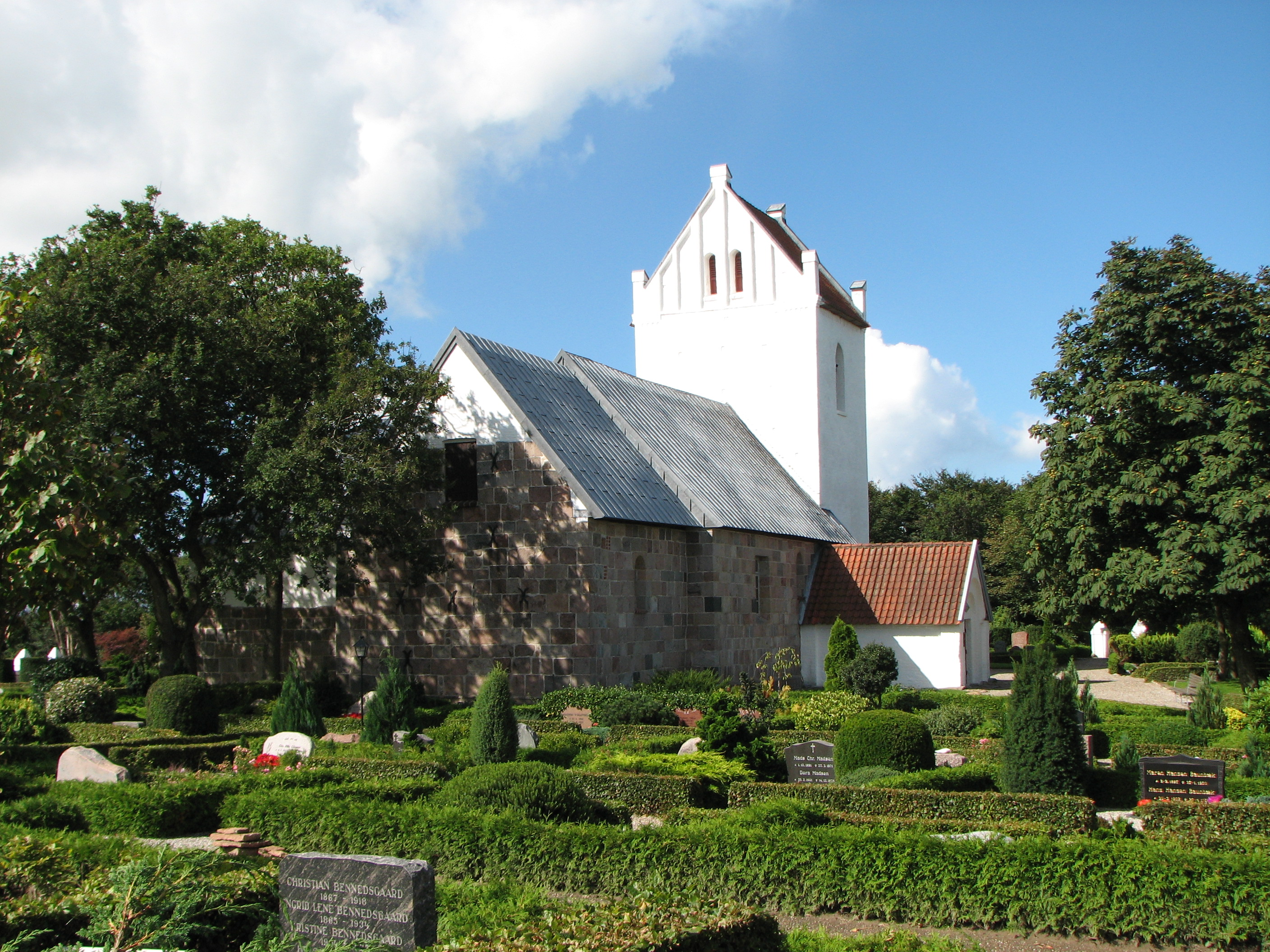 Vedersø Kirke in Denmark, photo by author JEK, Jens Christensen, Haderslev, Denmark